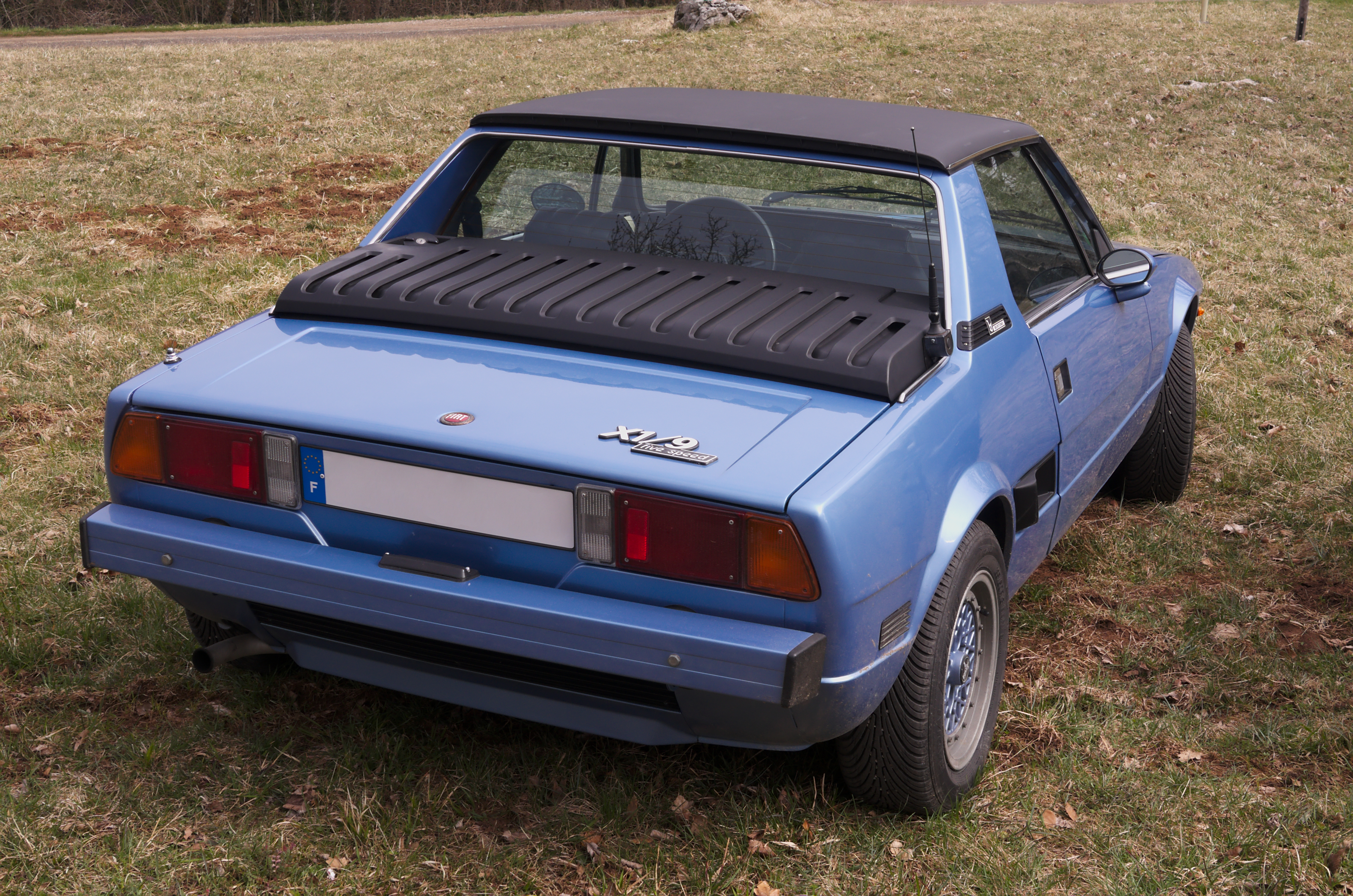 Sortie Soupapes dégrippées 07-04-2013 - Fiat X1-9